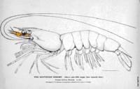 Antennules de crevette